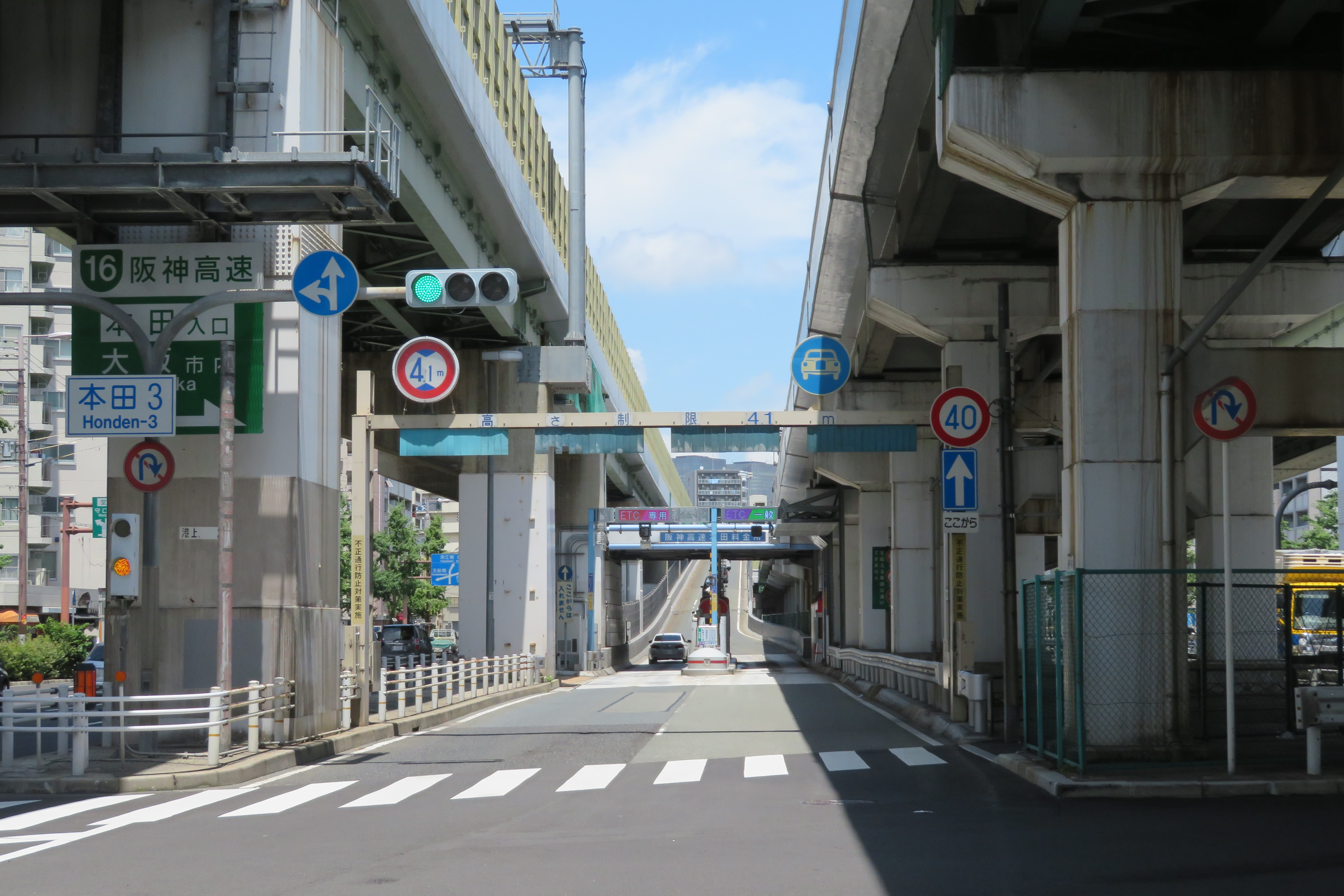 阪神高速道路16号大阪港線本田入口